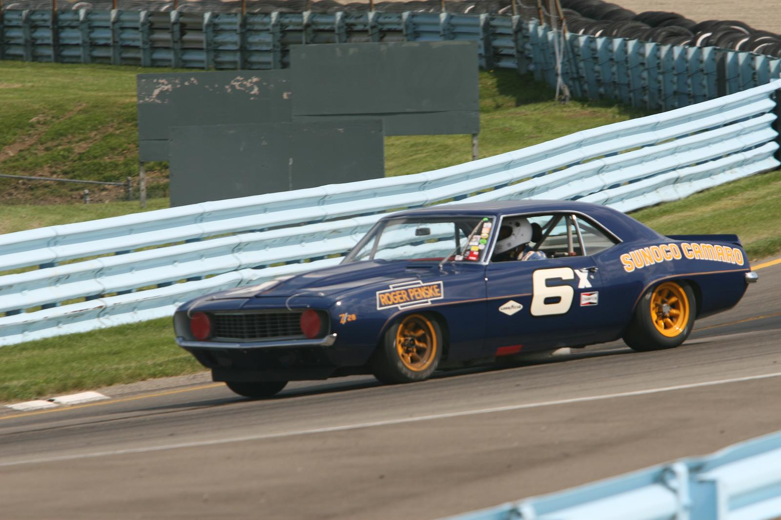 6x - 1969 Chevrolet Camaro (302cid) Jim Hague